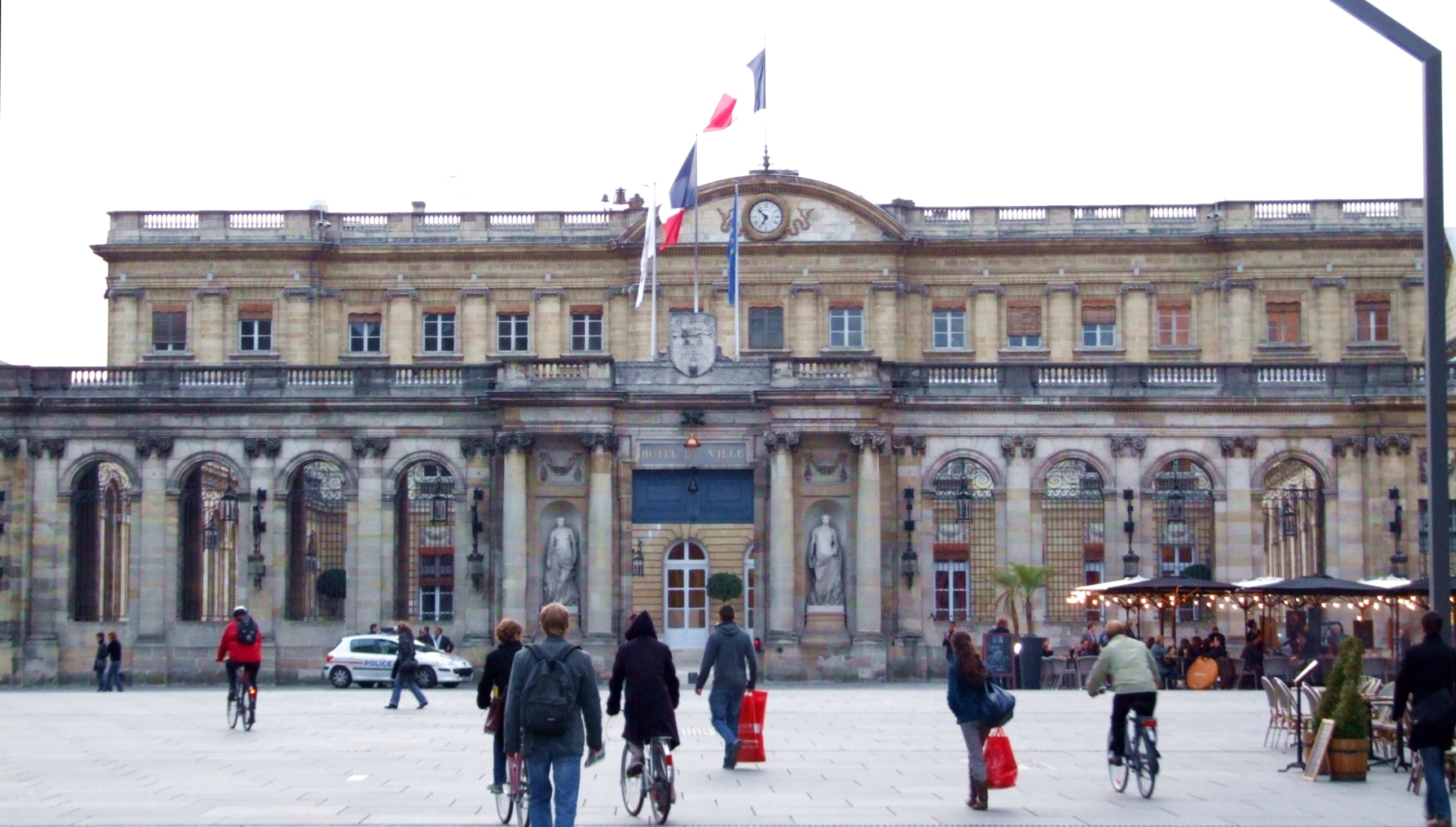 Bordeaux, Gironde, FRANCE